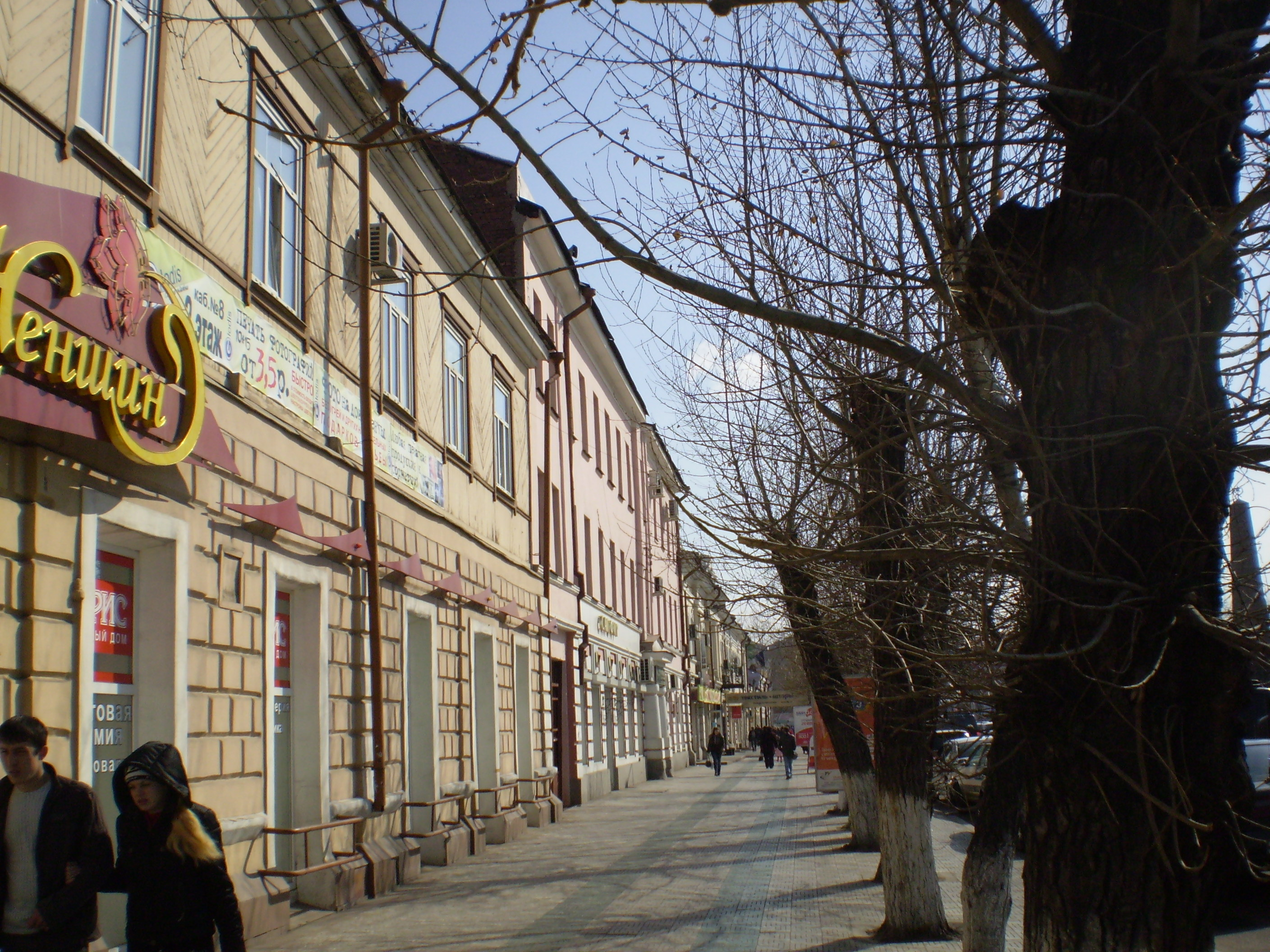 Северная граница площади.